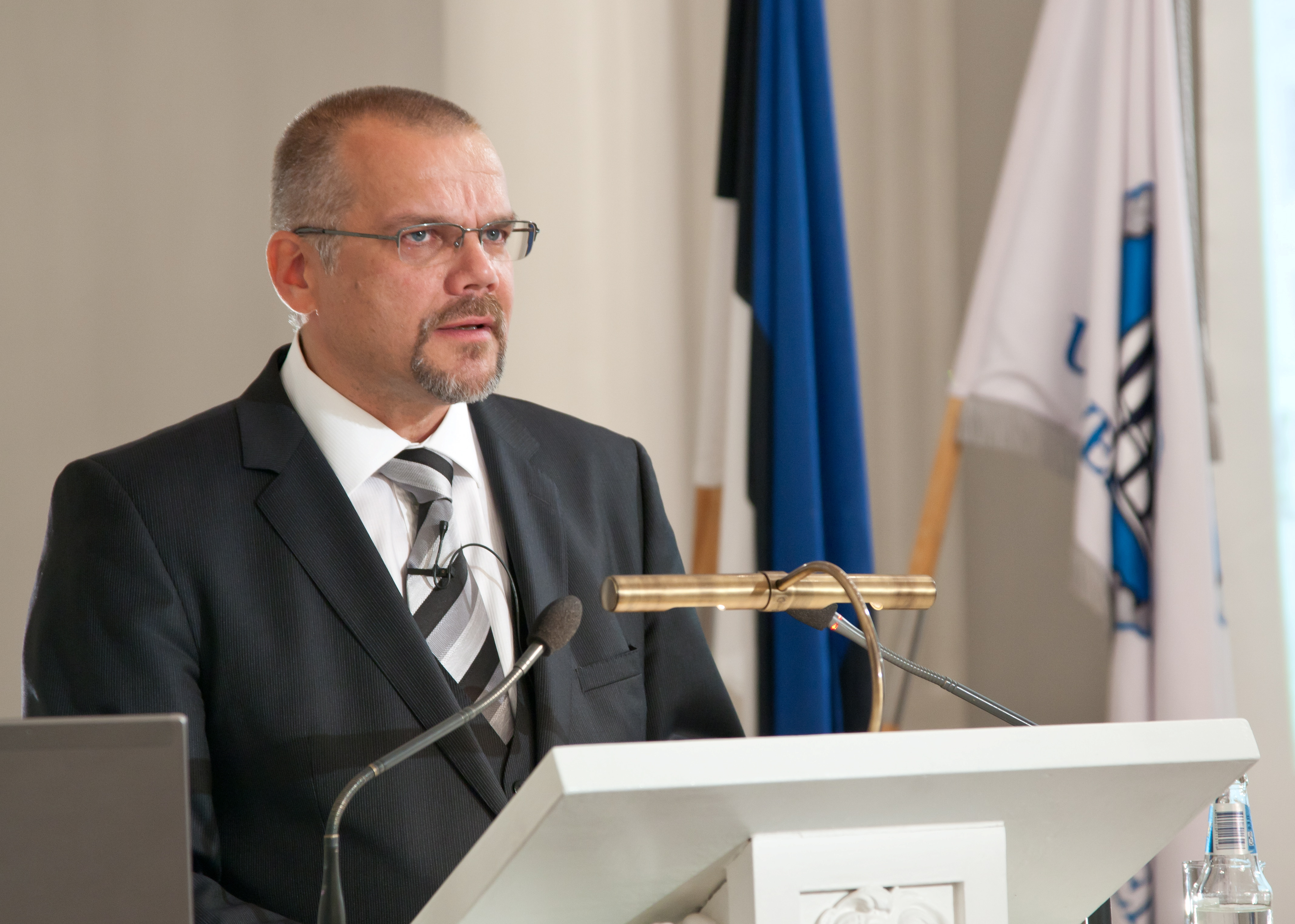 6. septembril 2011 pidas Tartu Ülikooli eesti kirjanduse professor Arne Merilai TÜ aulas inauguratsiooniloengu teemal „Luulekeele olemus”.